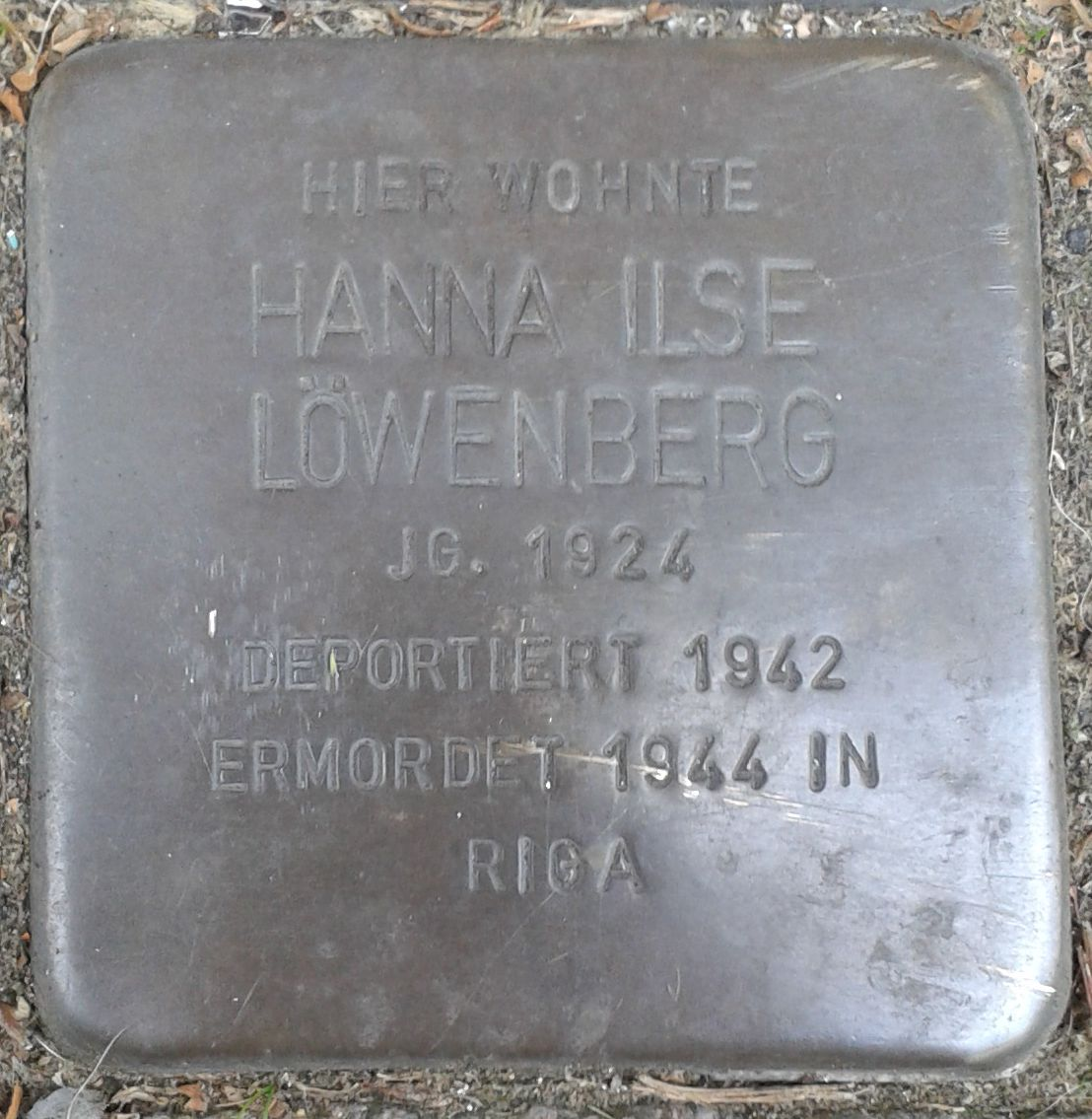 Stolperstein Datteln Marktstraße 5 Hanna Ilse Löwenberg